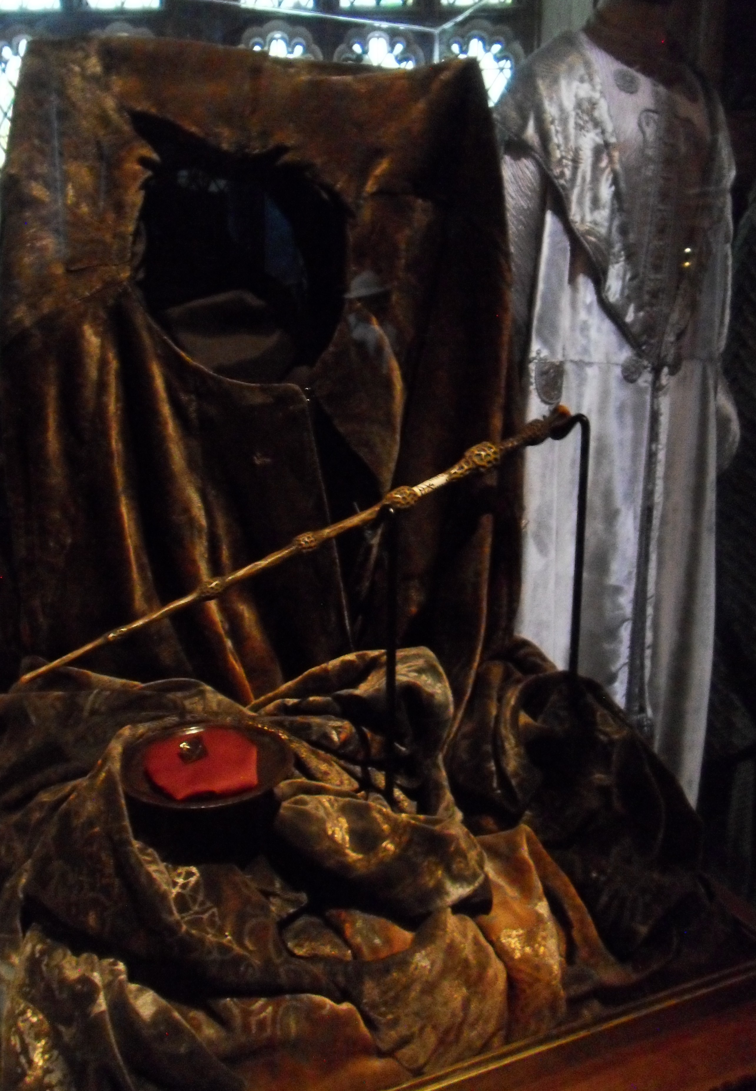 Les reliques de la mort, Harry Potter Exhibition, Cité du Cinéma, Saint Denis (Paris) avril 2015